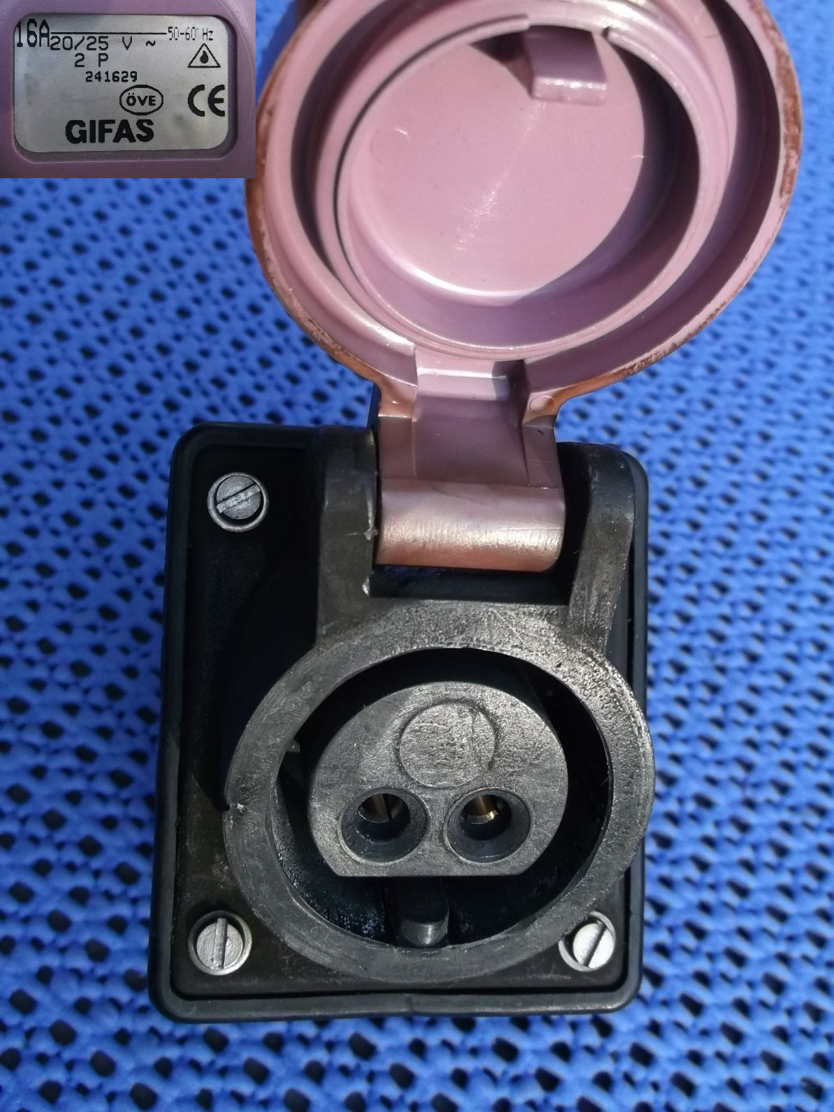 CEE Steckdose für Kleinspannung 24V, 16A, 2P, 50-60 Hz, violettes Gehäuse ohne Hilfsnase